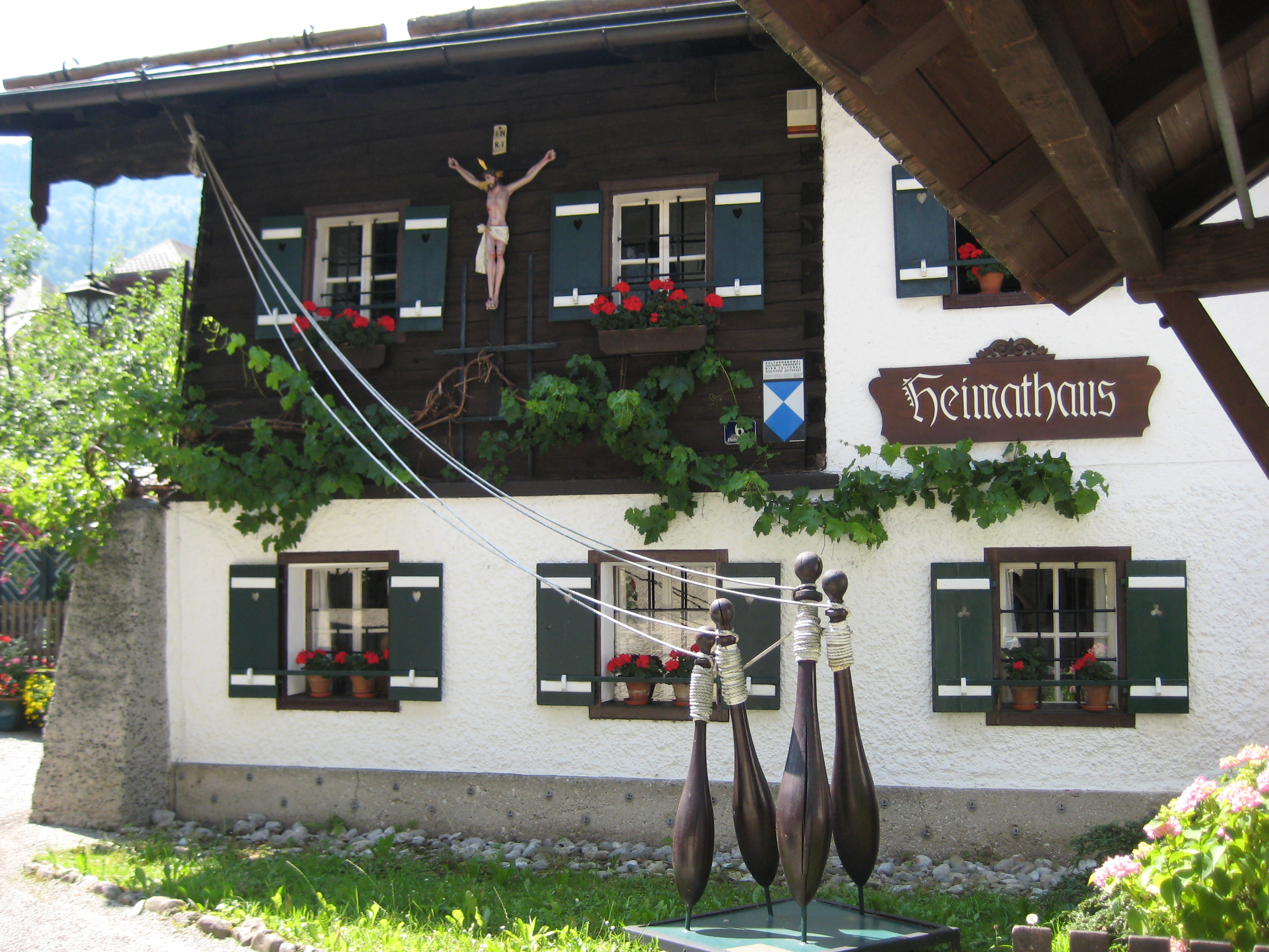 Kuranstalt/Sanatorium, Heimatmuseum